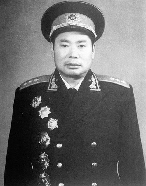 杨得志授衔照